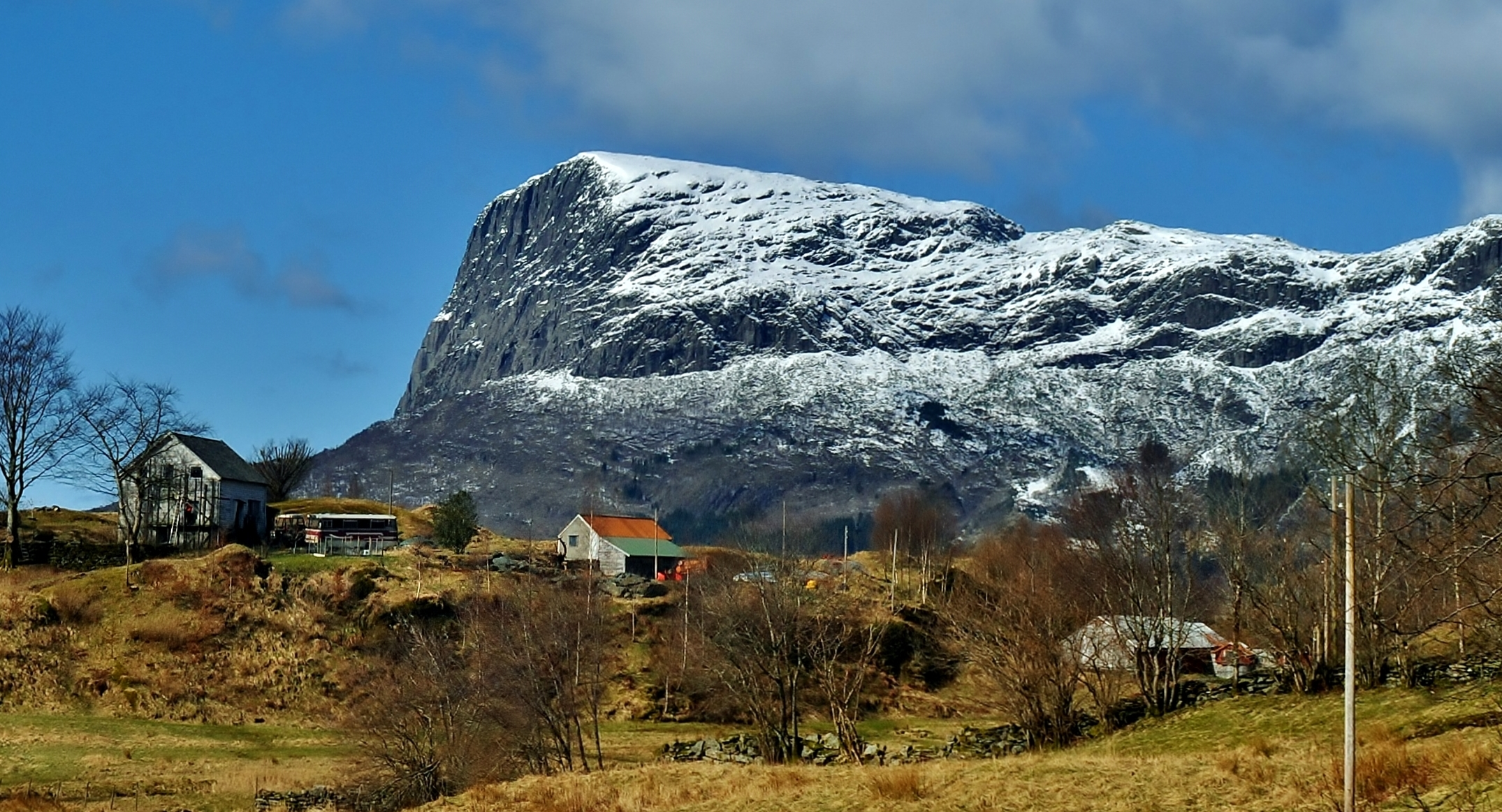 Biletet er teke mot vest frå garden Hellem i Lifjorden. Risnesnipa i bakgrunnen (777 moh) er den sørlege delen av fjellet Lihesten i Hyllestad kommune, Sogn og Fjordane. Lihesten ligg på fastlandet på nordsida av munningen på Sognefjorden. Gardshus på Hellem i framgrunnen. Ruteflyet Havørn, som kom sørfrå, flaug den 16. juni 1936 inn i fjellveggen ca 80 - 100 meter under høgste punktet på Risnesnipa